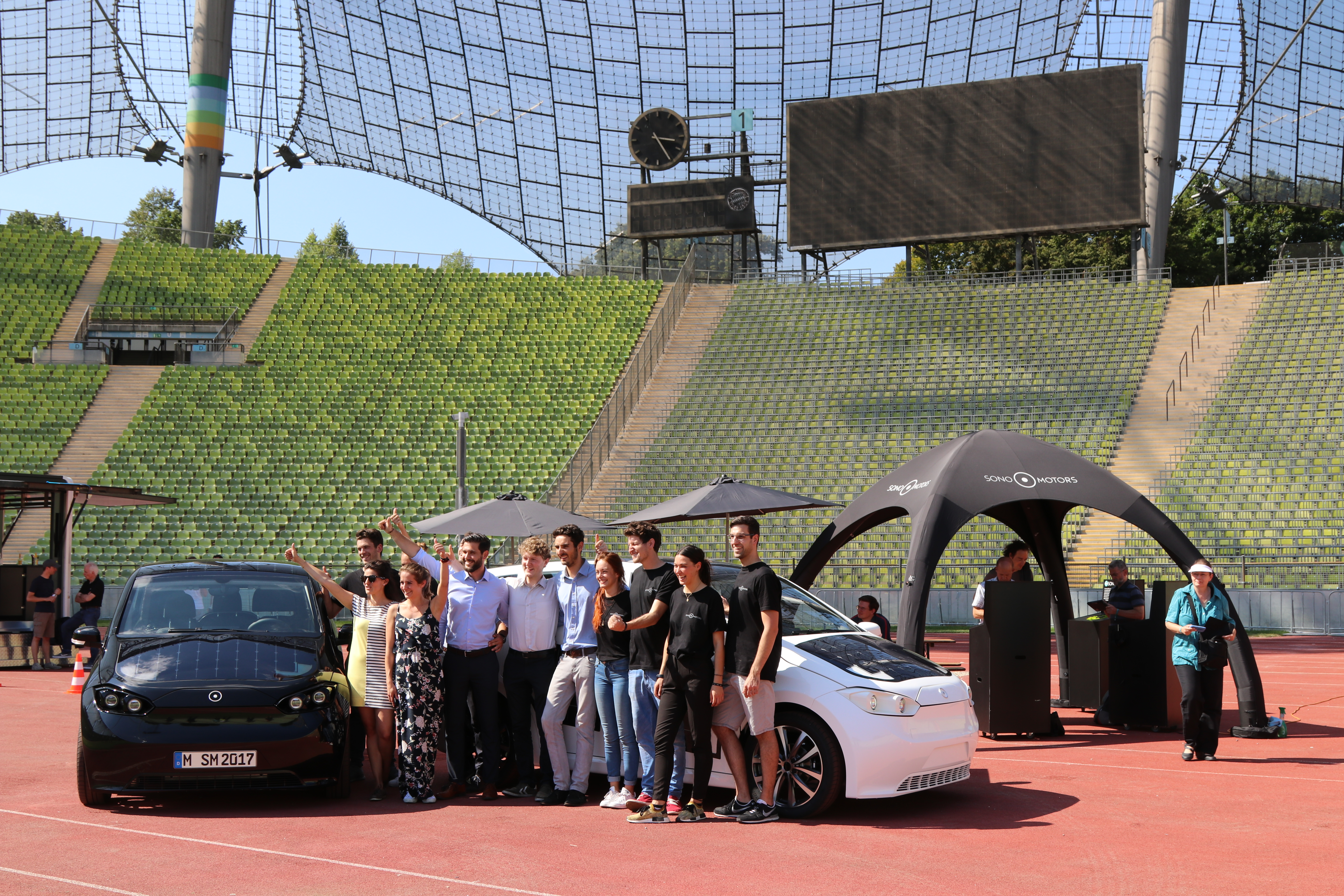 Zwei Prototypen des Modells Sion von Sono Motors GmbH bei Testfahrten im Münchner Olypiastadion mit den Mitarbeitern. Im Zentrum die drei Gründer